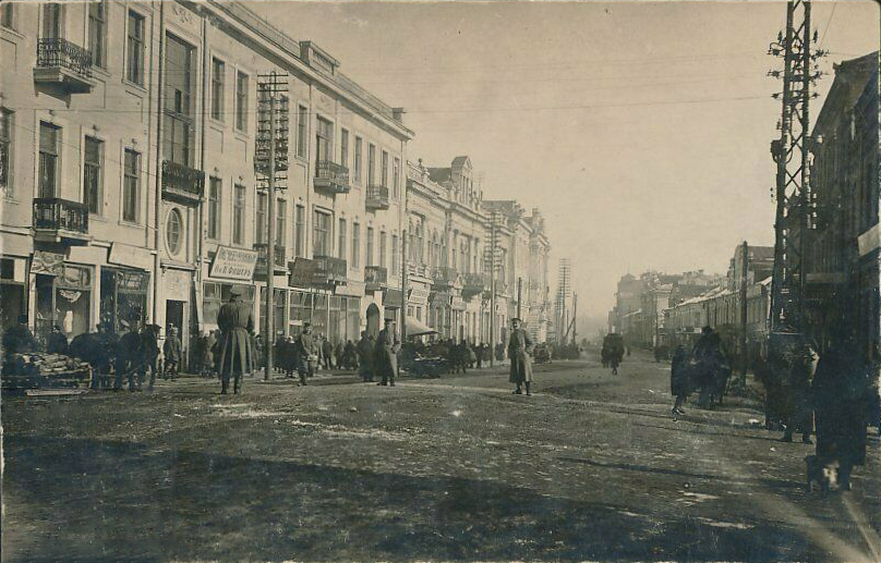 Беларуская (тарашкевіца): Менск (Miensk), вуліца Захараўская (vulica Zacharaŭskaja) ад скрыжаваньня з Лошыцкай (vulica Łošyckaja)